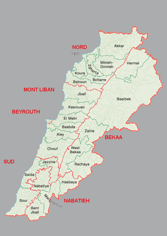 Carte du Liban (en français) / Map of Lebanon (in french)